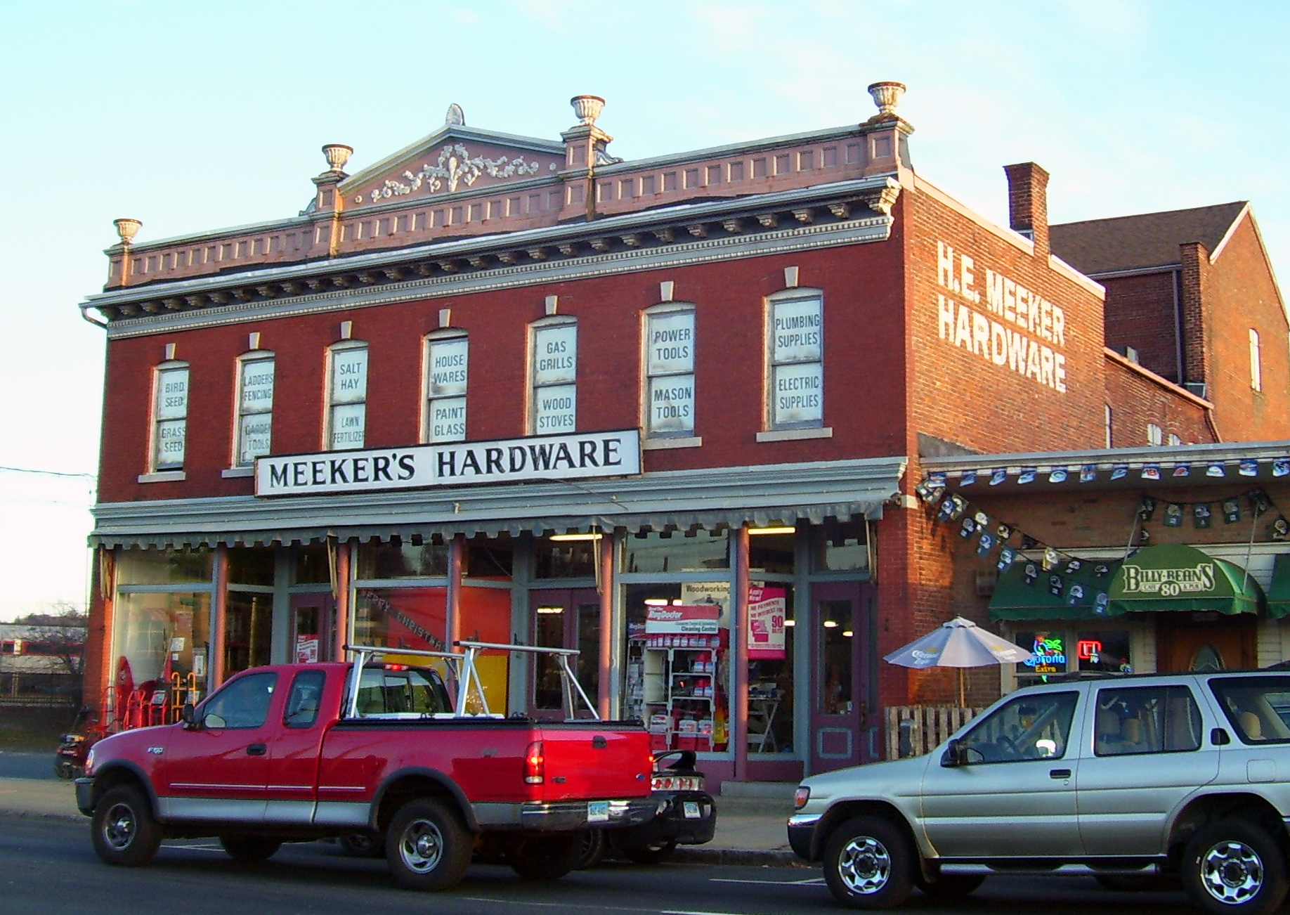 Meeker's Hardware in Danbury, CT USA